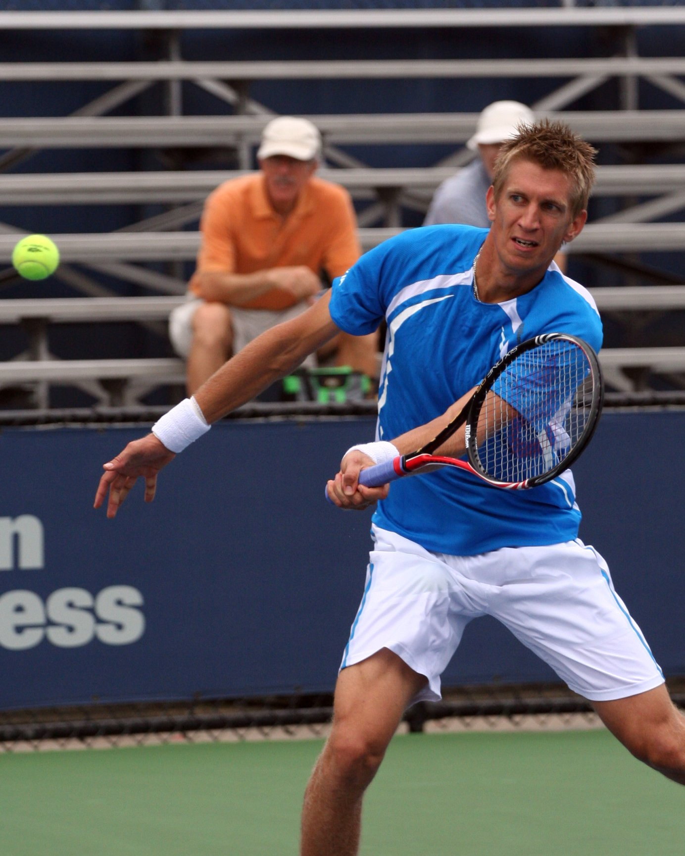 U.S. Open Sept. 3, 2010